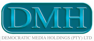 Logo von Democratic Media Holdings